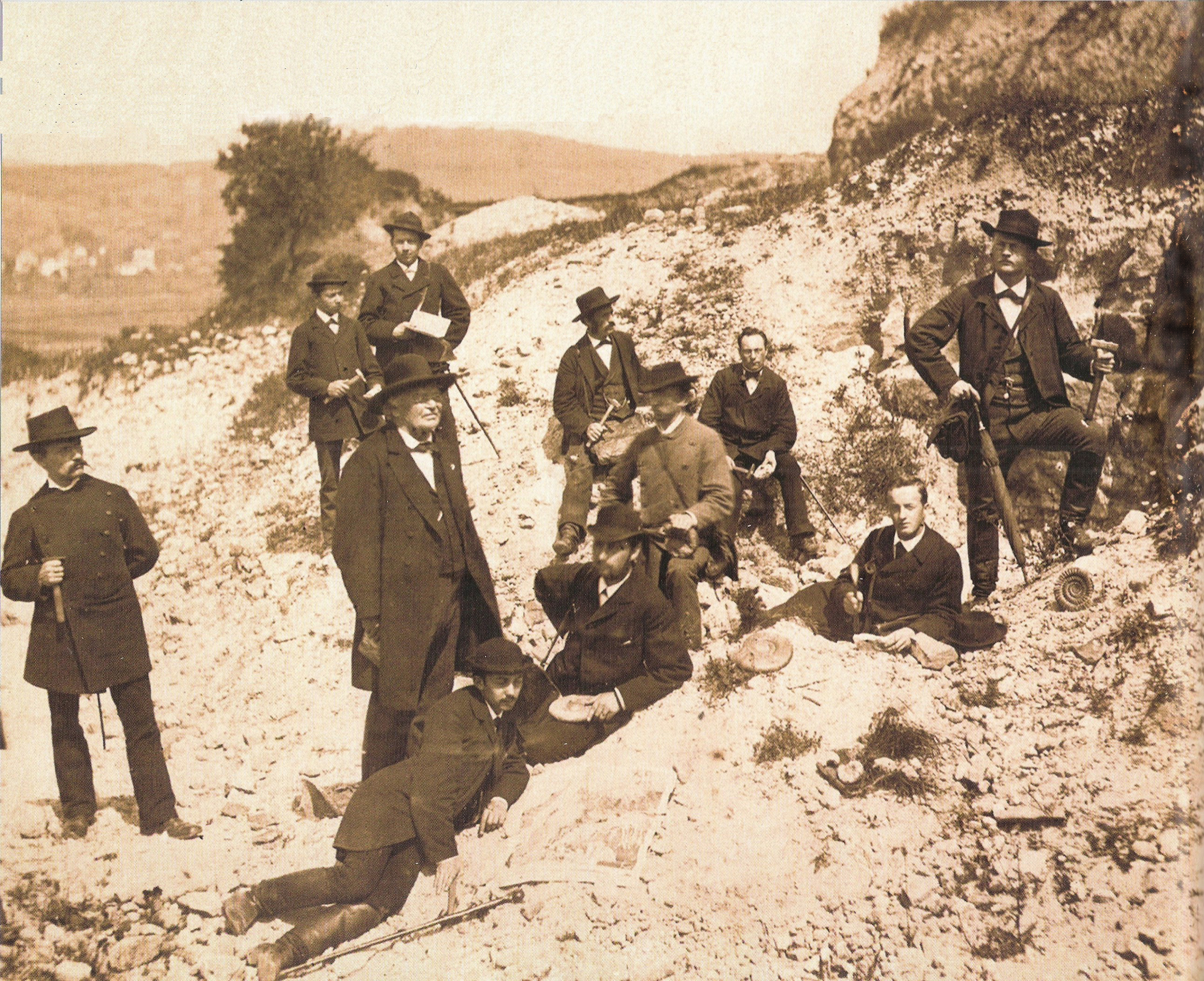 Friedrich August Quenstedt (in der Mitte stehend) mit seinen Mitarbeitern und Studenten bei Ausgrabungen auf der Schwäbischen Alb.